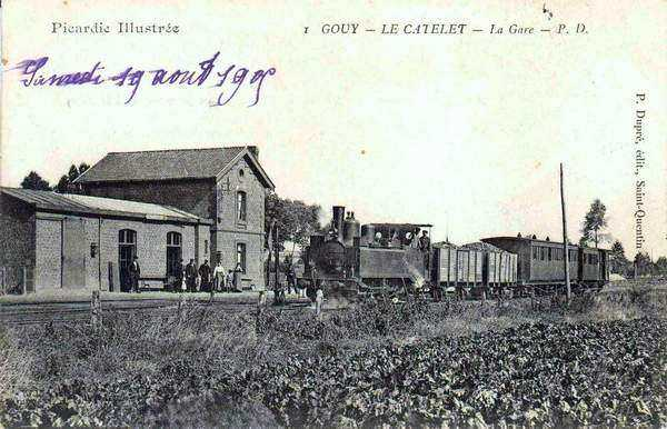 Gouy-Le Catelet - la gare vers 1905